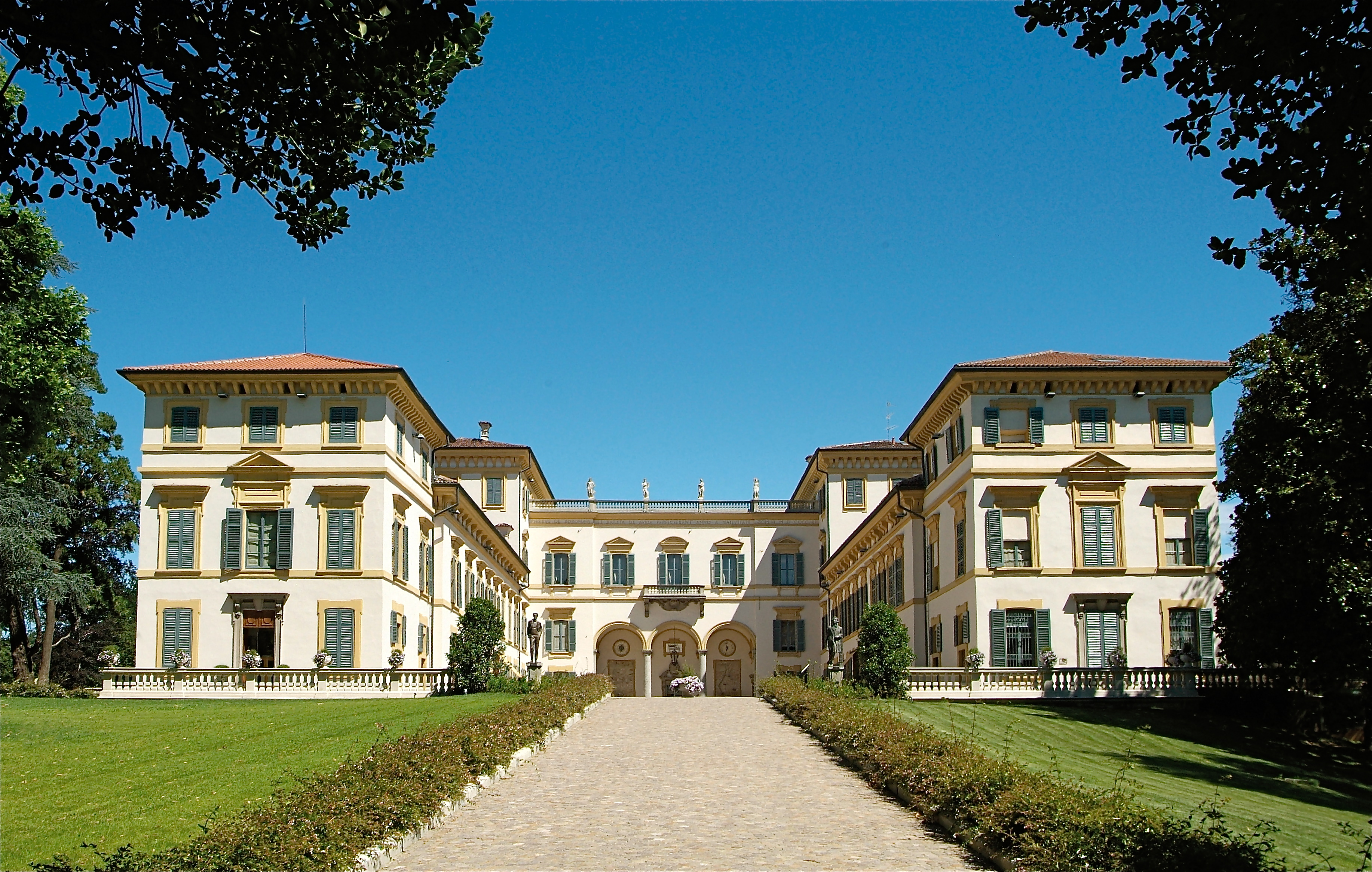 La facciata della Villa San Carlo Borromeo a Senago (MI)